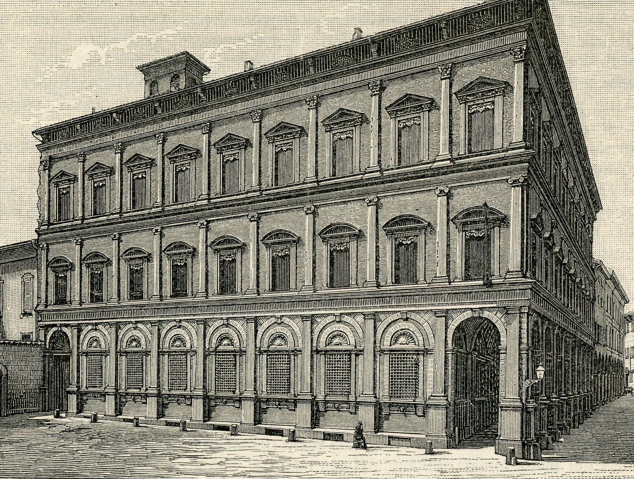 Bologna: palazzo Malvezzi-de'Medici (xilografia).